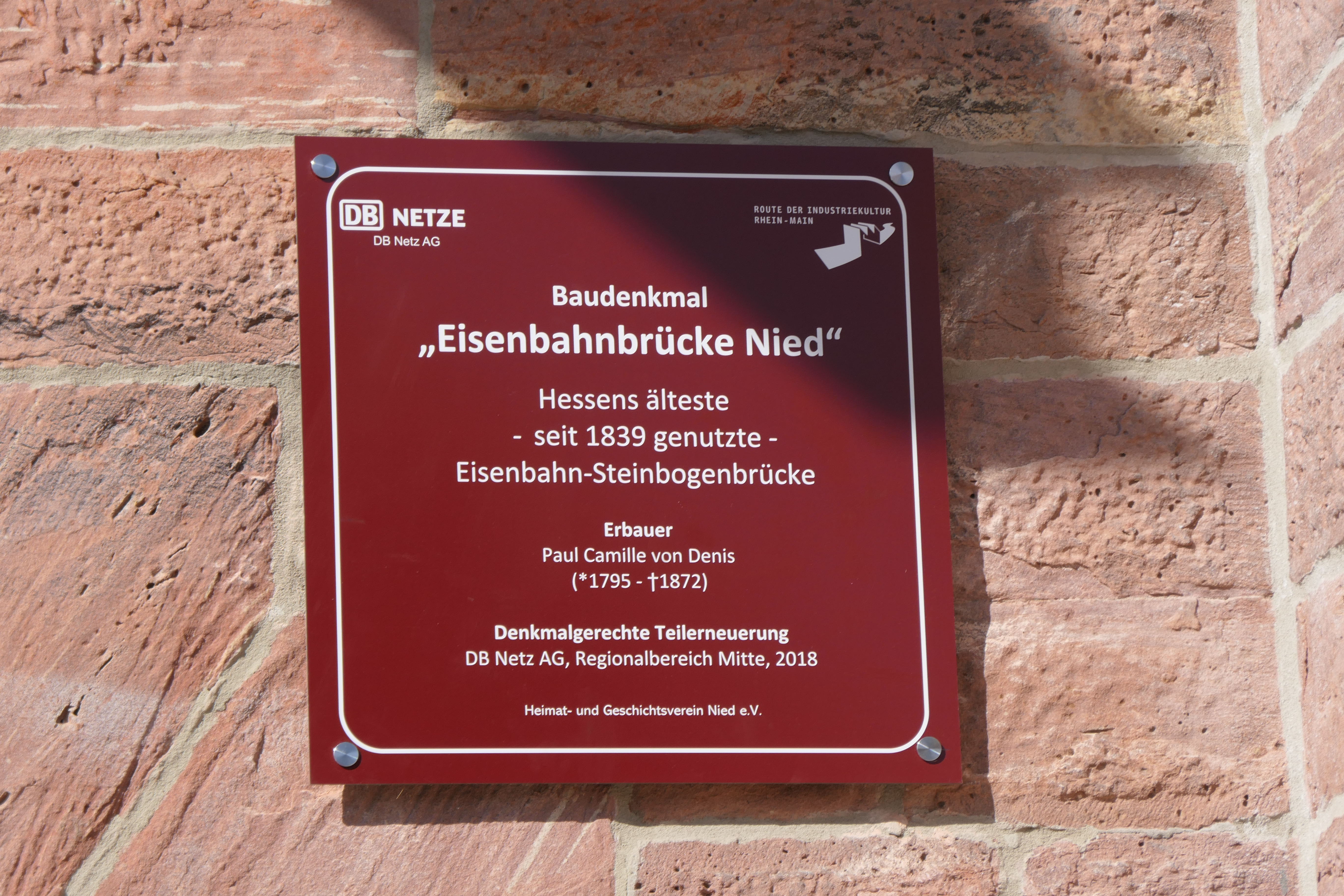 Infotafel an der Eisenbahnbrücke Nied. Die Infotafel wurde nach der denkmalgerechten Teilerneuerung der Brücke neu angebracht.